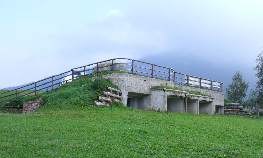 Ex-poligono monte Bondone e nuovo osservatorio